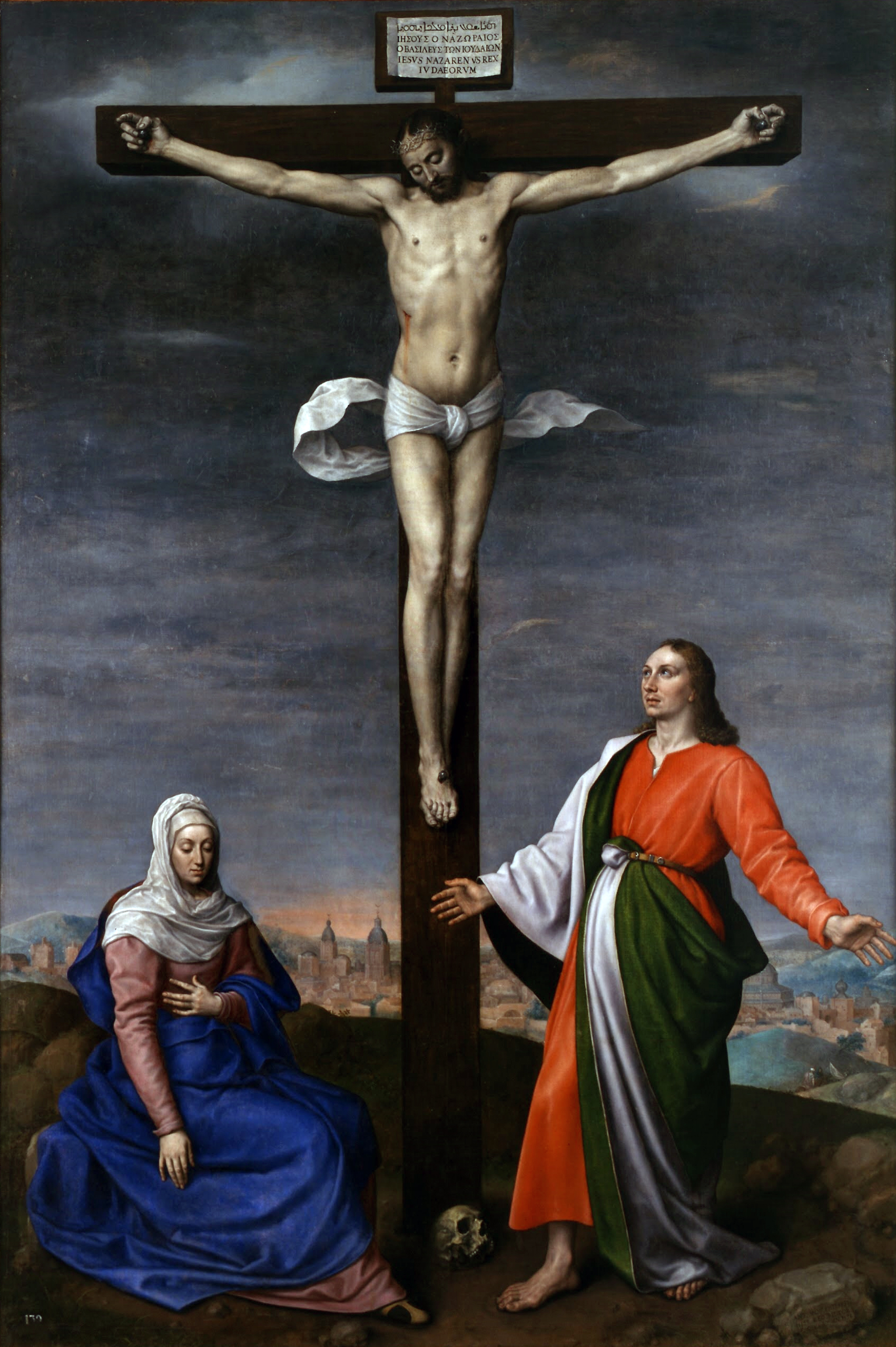 La obra muestra a Jesucristo crucificado junto a la Virgen María y San Juan Evangelista.